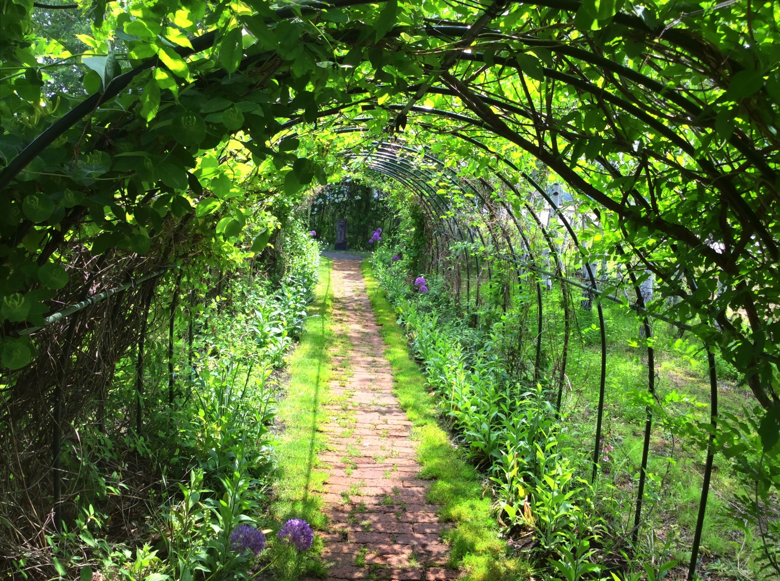 上野ファーム（UENO FARM）